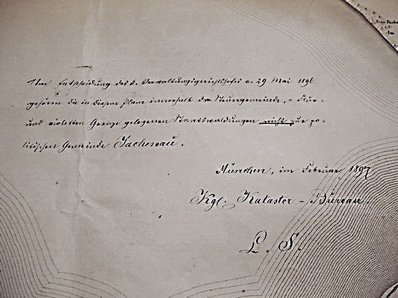 Eindruck in Karten der Jachenau nach 1897 hinsichtlich außermärkischer Gebiete